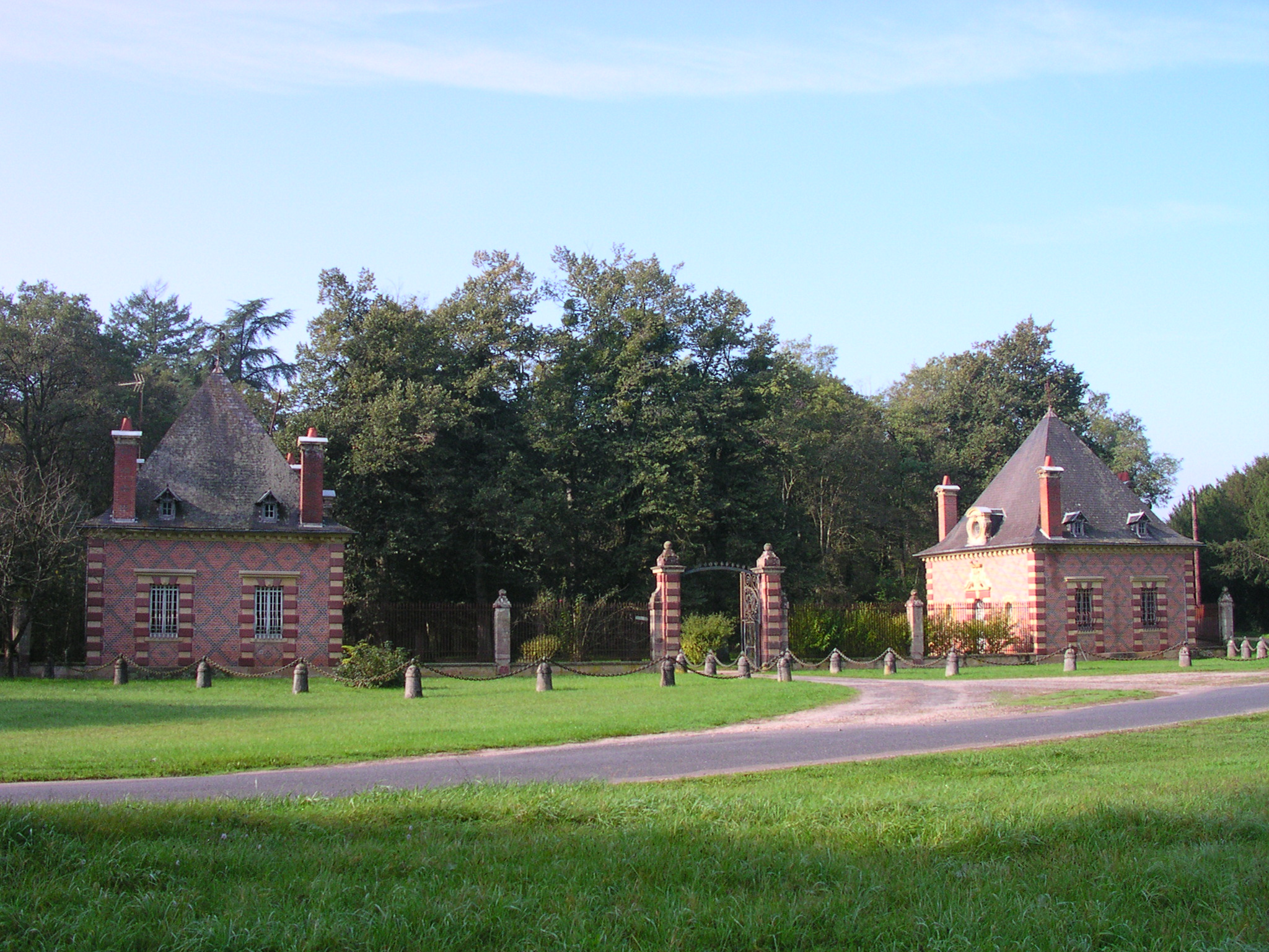 L'entrée du château d'Avrilly à Trévol, Allier, France.